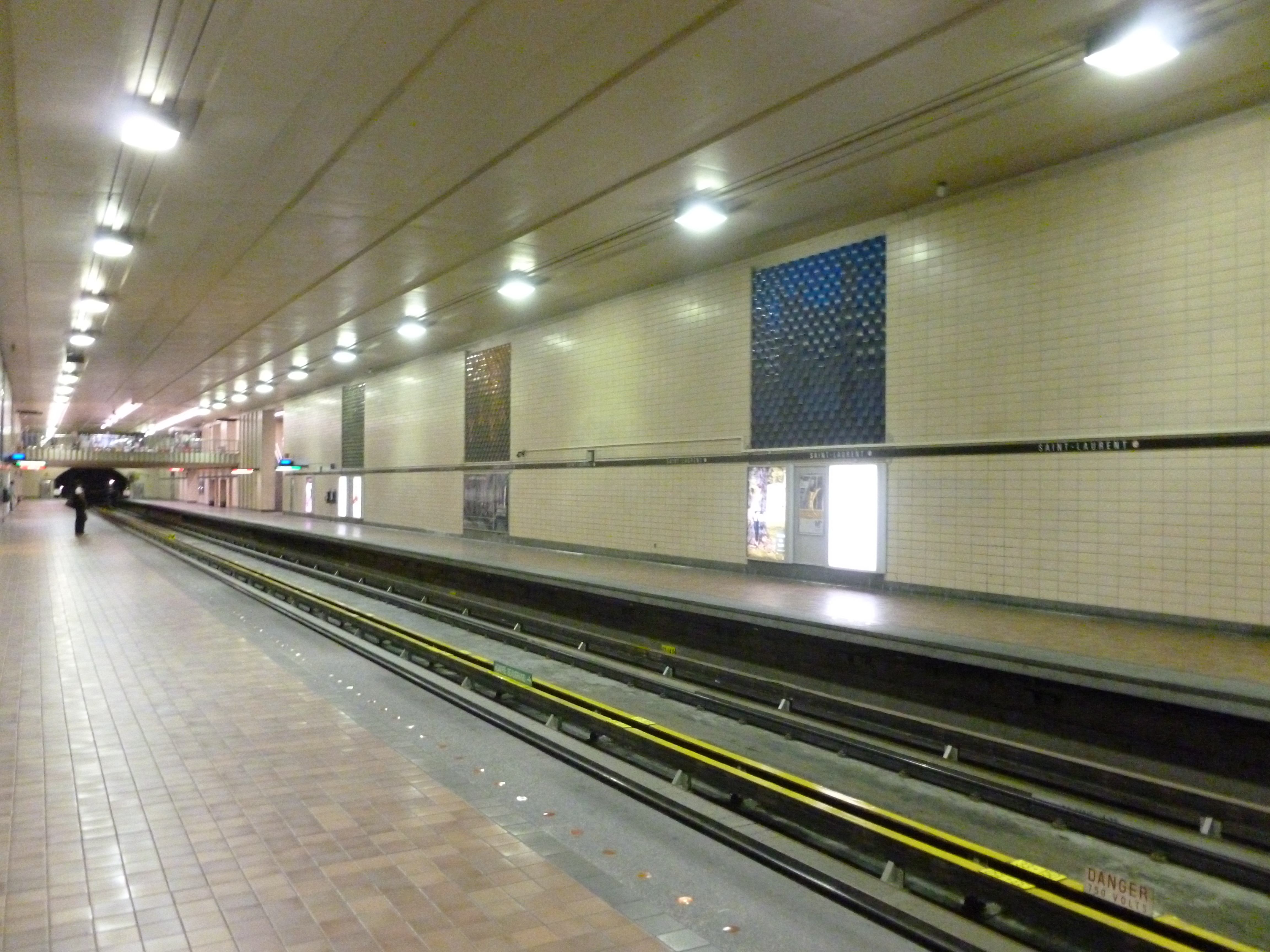 Station de Métro Saint-Laurent